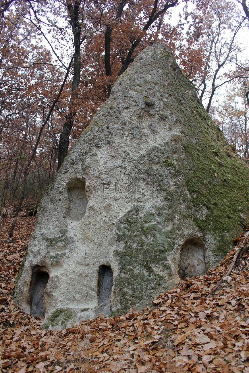 B4g, Cserépváralja, Furgál-völgy, 4. kúp